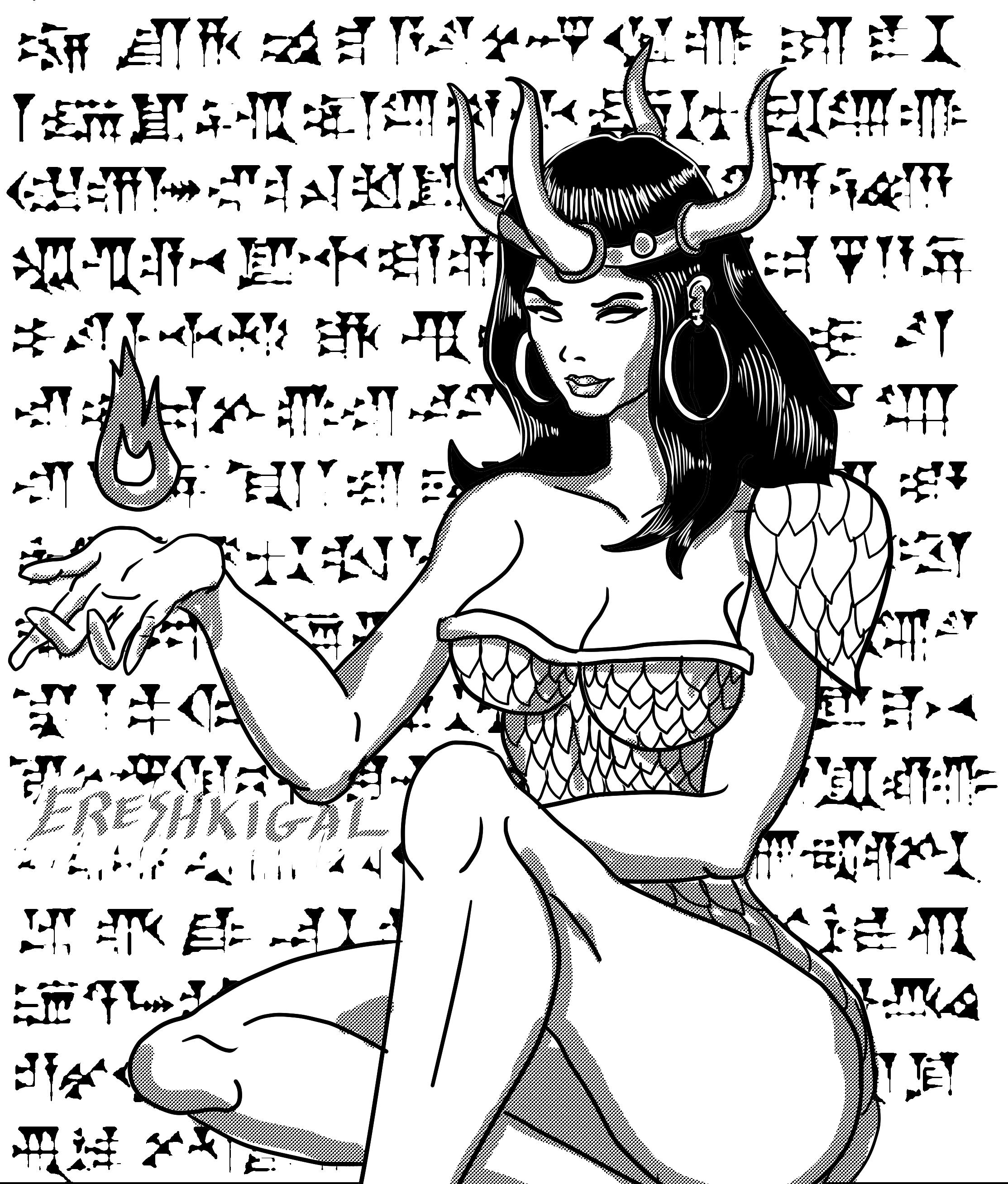 Diosa Ereshkigal (Interpretación de un autor)